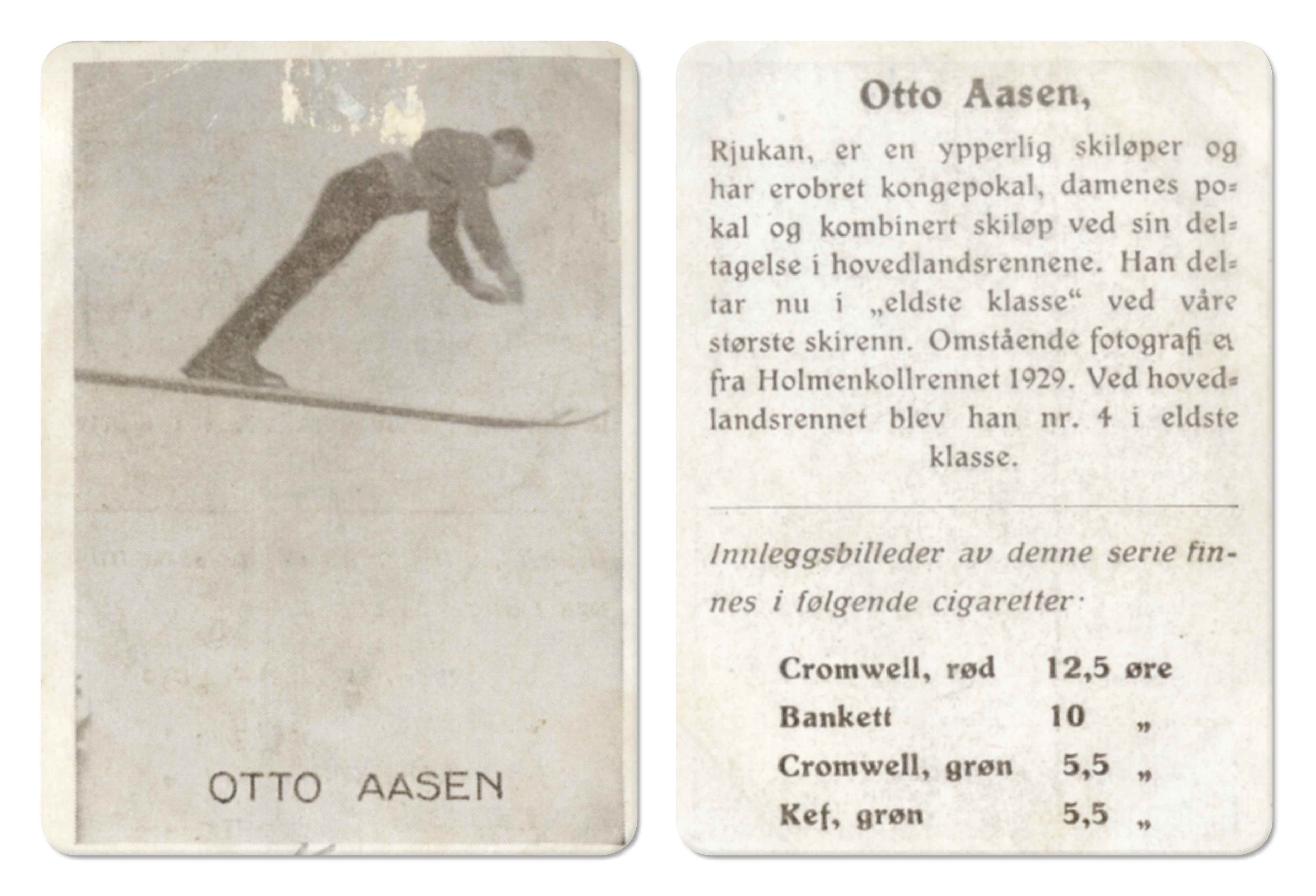 Tekst på baksiden: Otto Aasen, Rjukan, er en ypperlig skiløper og har erobret kongepokal, damenes pokal og kombinert skiløp ved sin deltagelse i hovedlandsrennene. Han deltar nu i "eldste klasse" ved våre største skirenn. Omstående fotografi er fra Holmenkollrennet 1929. Ved hovedlandsrennet blev han nr. 4. i eldste klasse. Merknad: Disse samlekortene med bilder av norske og internasjonale idretthelter fulgte med i sigarettpakker på 1920 og 30-tallet - derav tobakksreklamen på baksiden. Samlekortene kommer fra Sportsklubben Freidigs arkiv, og inneholder nærmere 90 unike kort pent plassert i et samlealbum. Samleren var den senere skipsmegler Finn Følling (1914 – 1985).